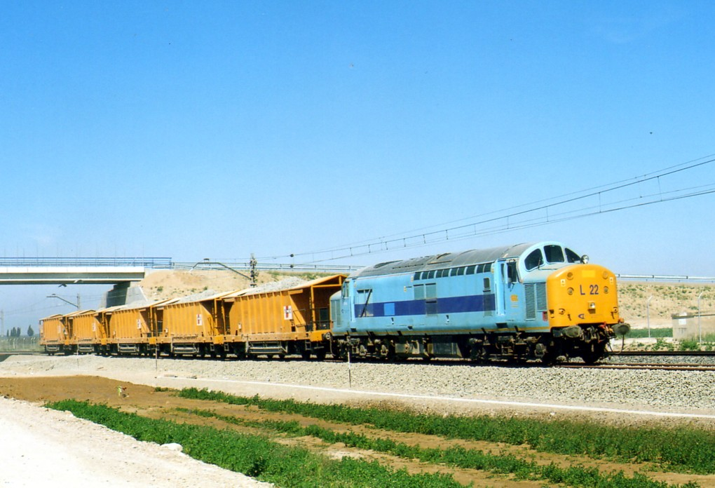 GIF L 22 à Zuera (Aragon), 37718 of EWS (UK)